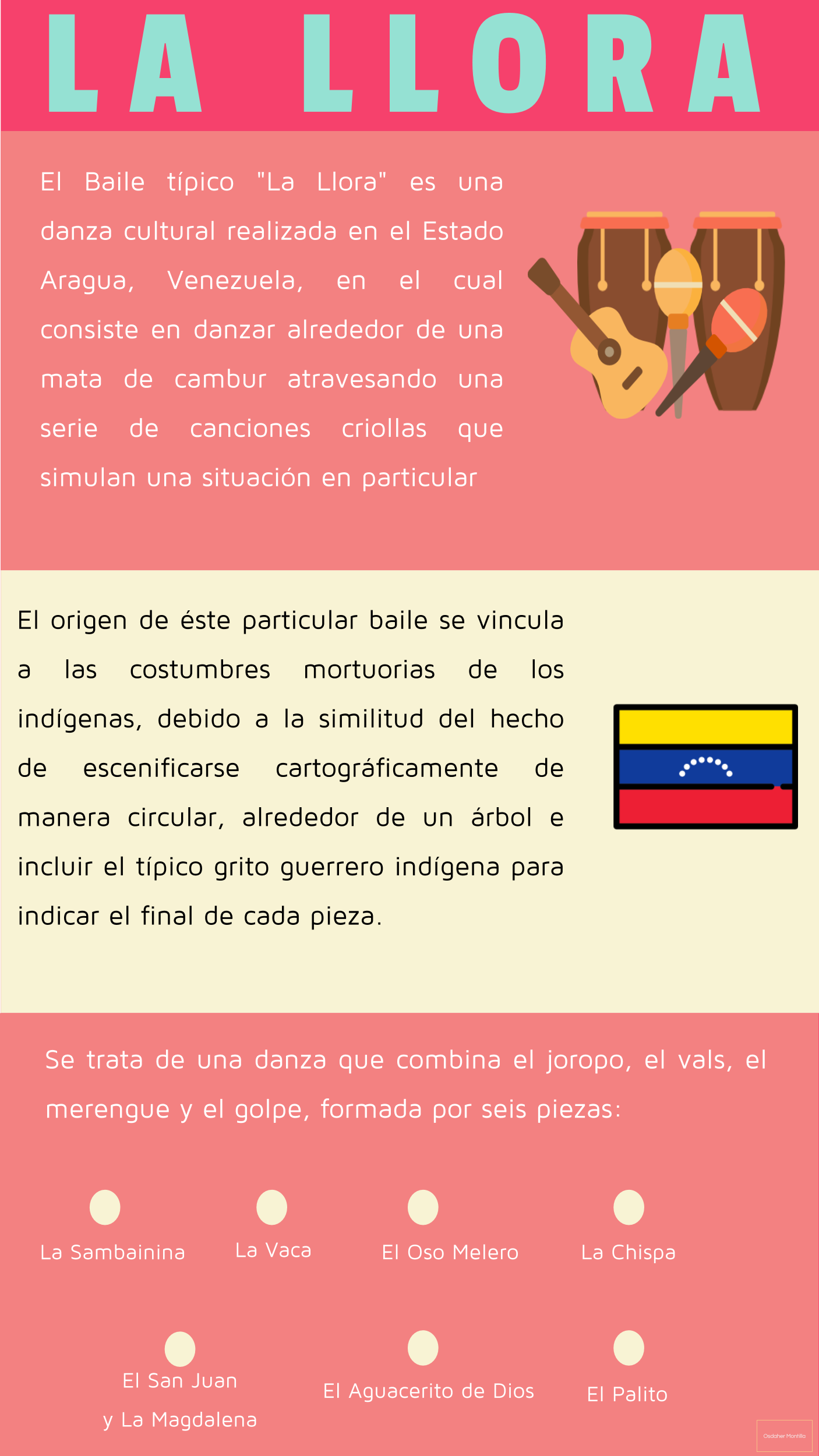 Material informativo con relación a 'La llora' (Baile típico venezolano)